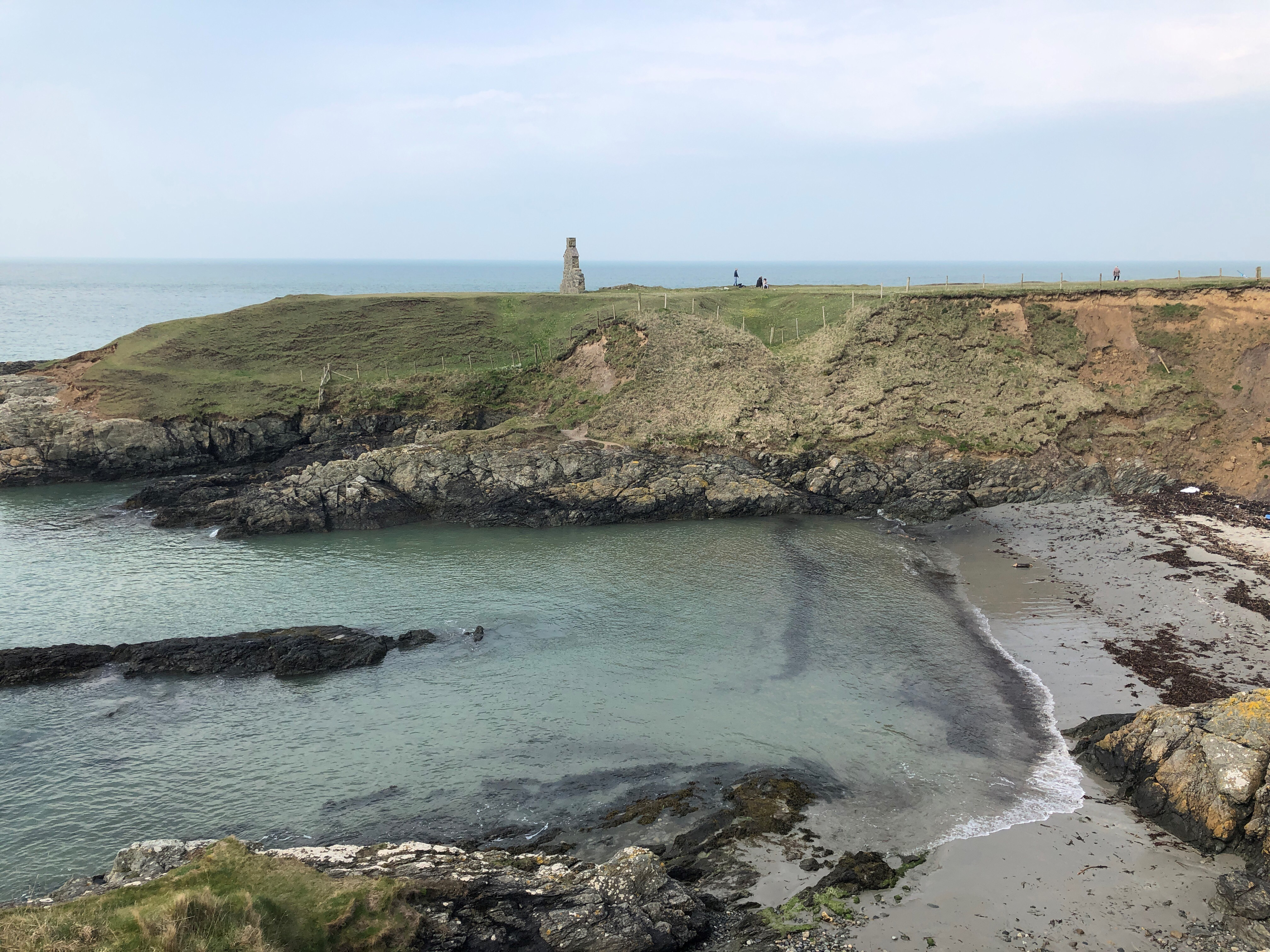 Porth Ysgaden